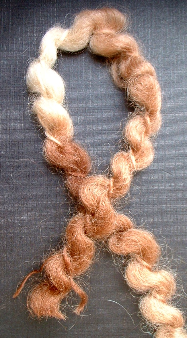 Boucle-Garn 3,6 ktex aus reiner Wolle